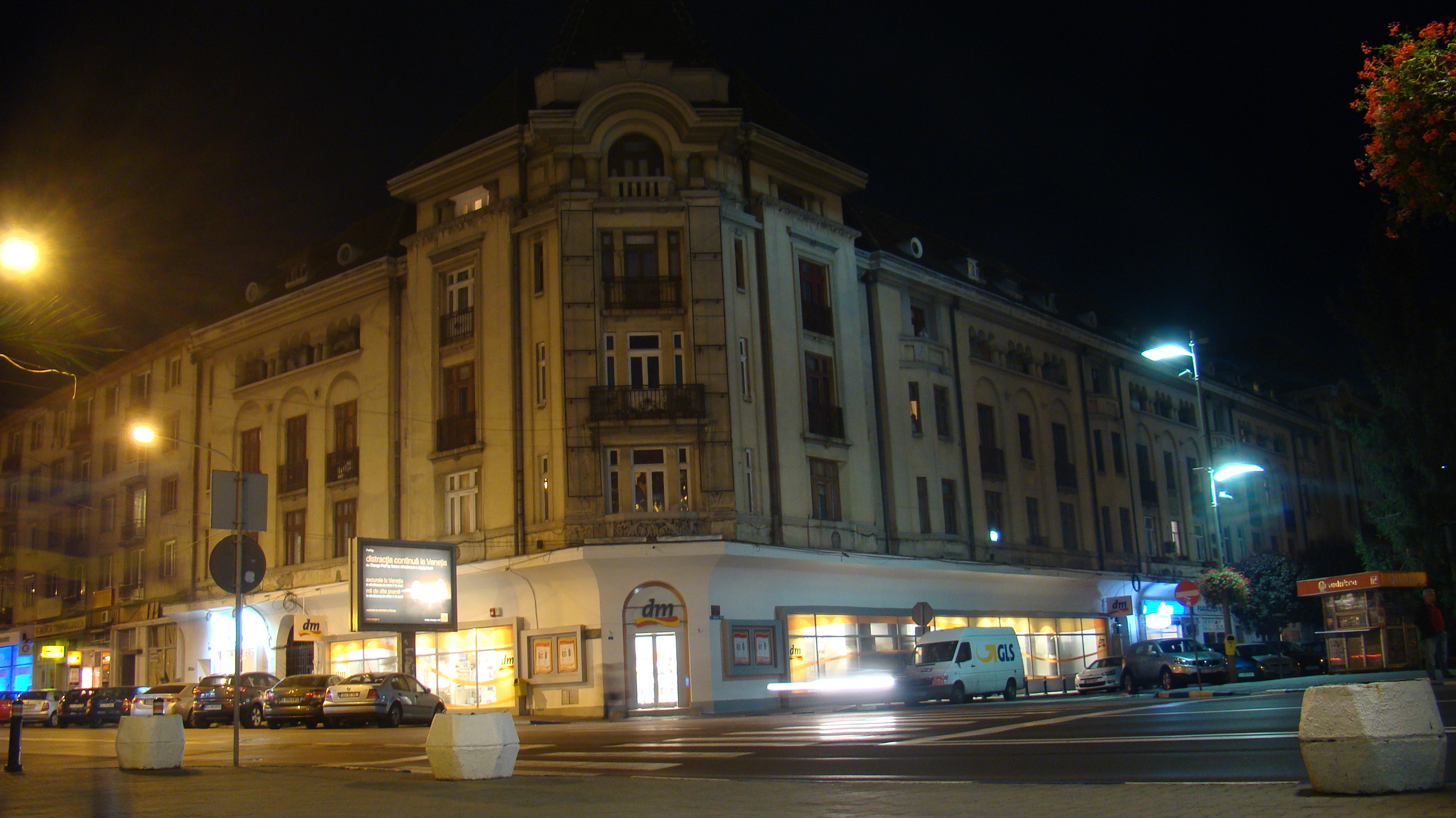 Blocul "Casa Albă"